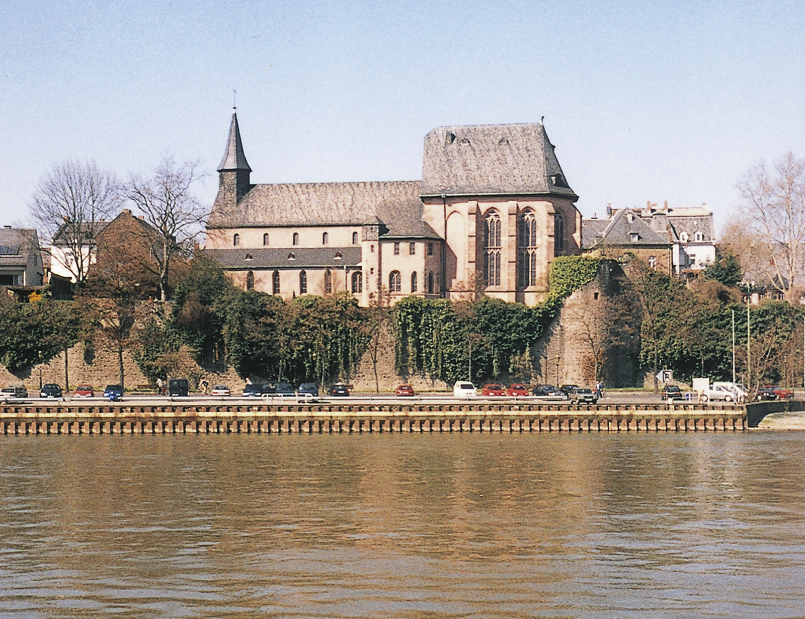 Justinuskirche, Frankfurt-Höchst, Südfassade, von der Schwanheimer Mainseite / St.Justinus Church, Frankfurt-Höchst. Photographed across river Main from Schwanheim.